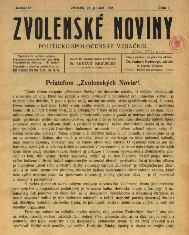 Titulný list mesačníka Zvolenské noviny, ktorý vychádzal na Slovensku pred prvou svetovou vojnou.